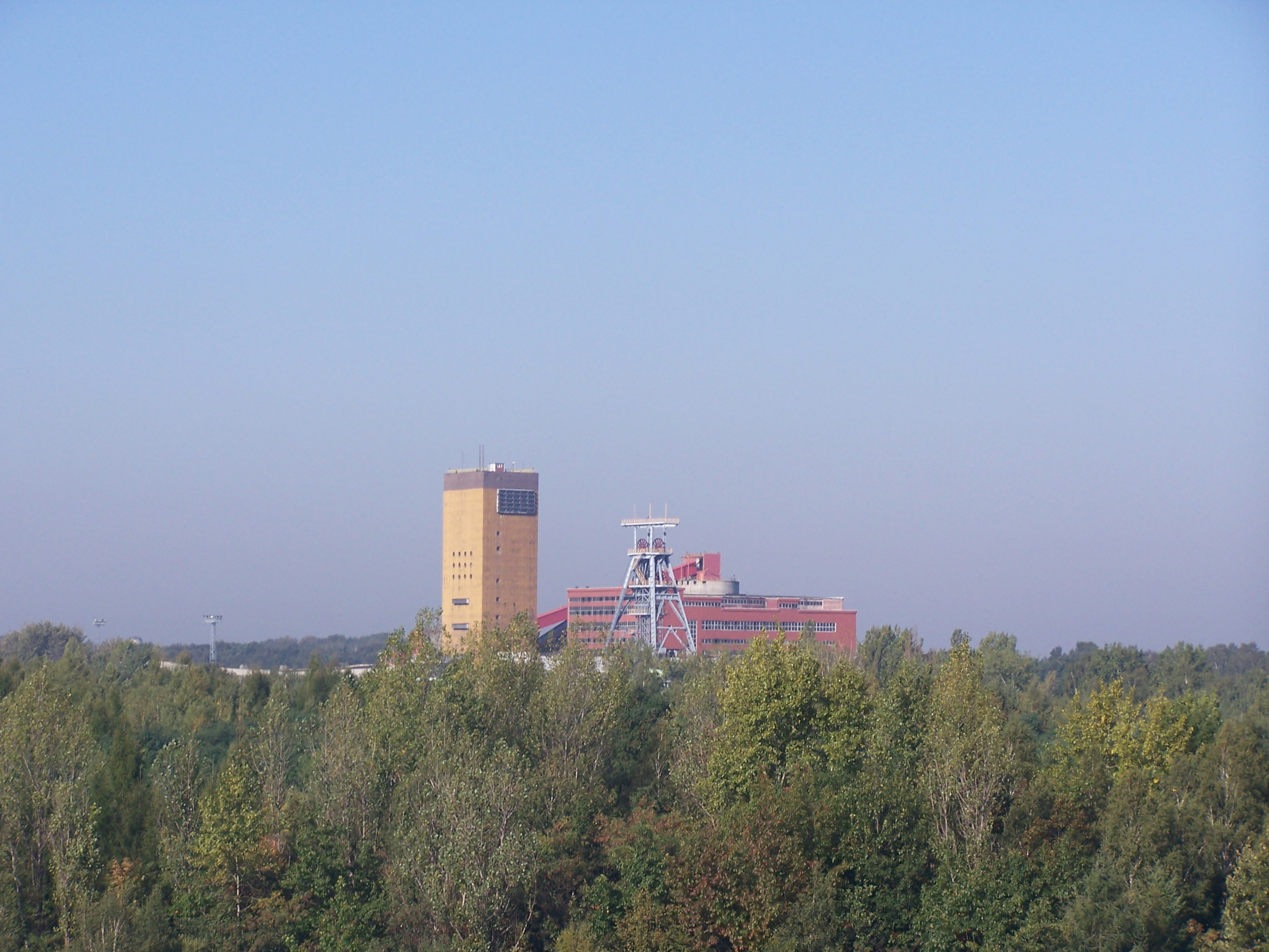 Kopalnia Węgla Kamiennego Staszic - Giszowiec, author: Ewkaa